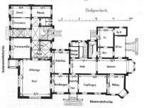 Bochum, Kreishaus, Grundriss Erdgeschoss